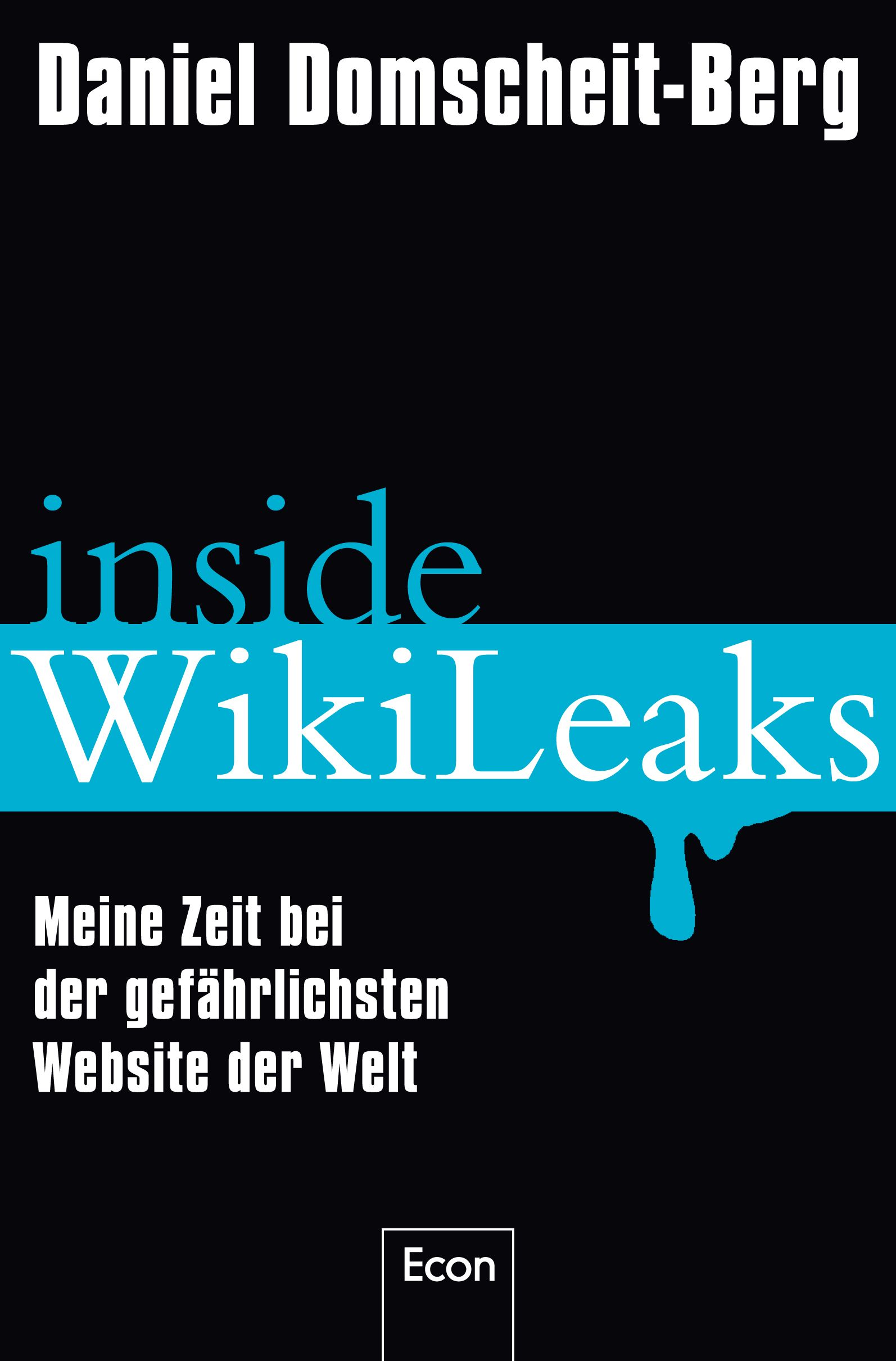 Book Cover of German book "Inside Wikileaks"